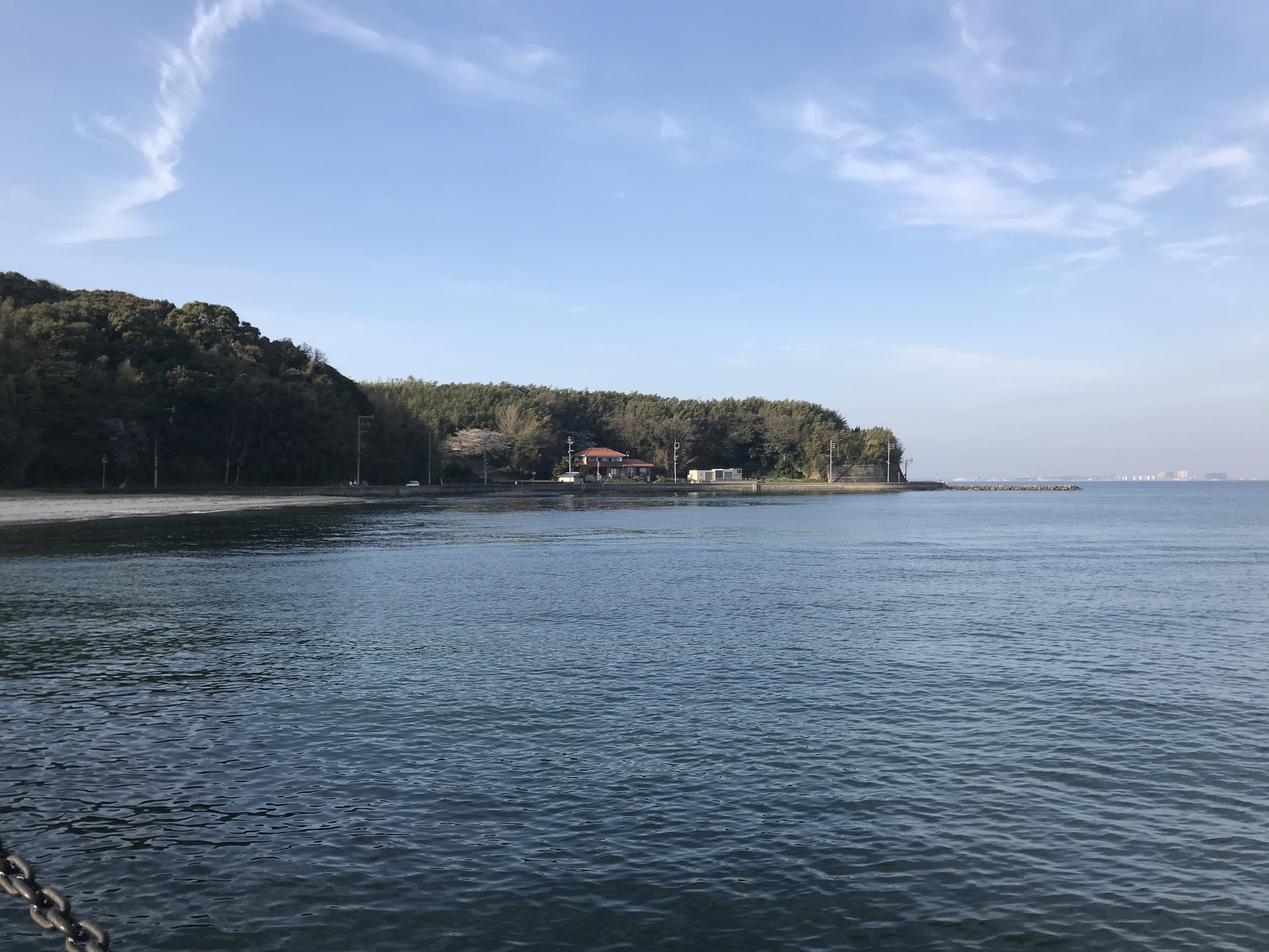 能古島・能古港付近より望む博多湾